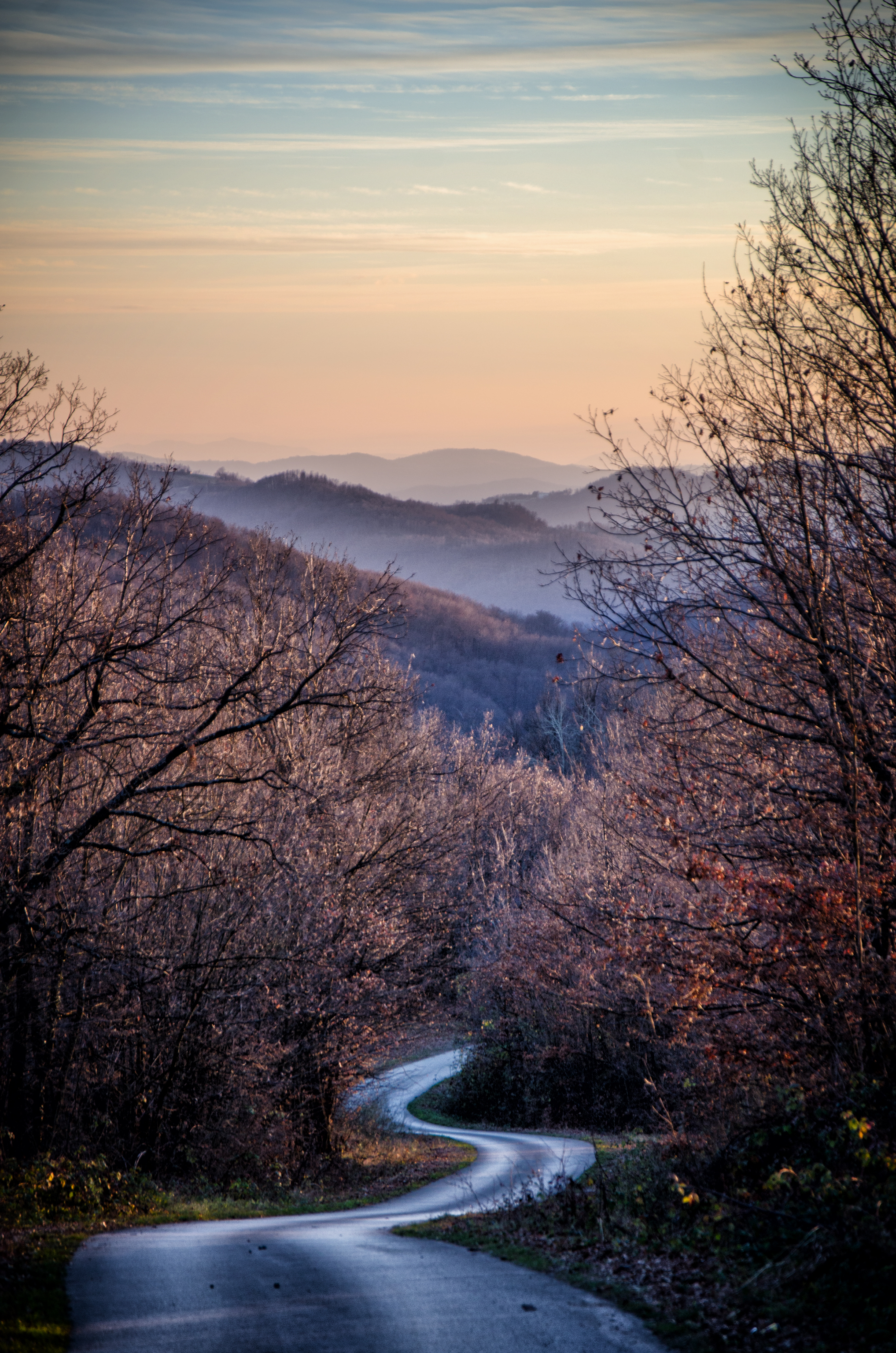 ID код добра није унесен ID добра: PPP031